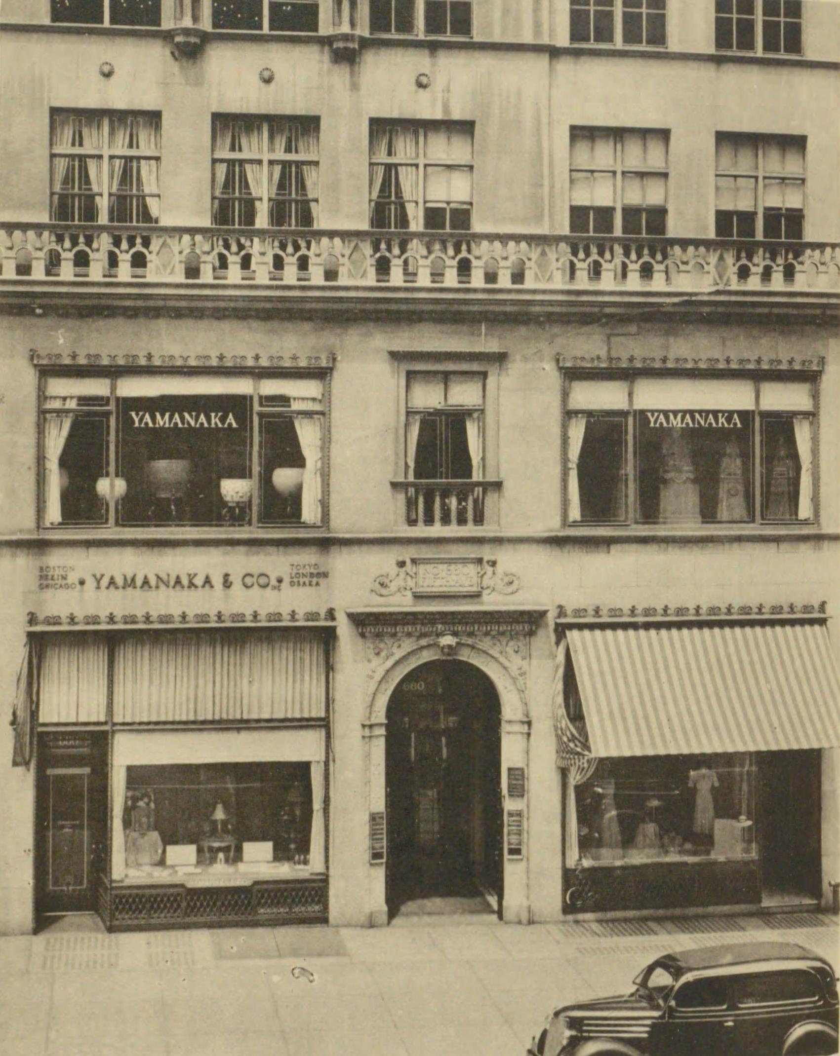 山中商会ニューヨーク支店